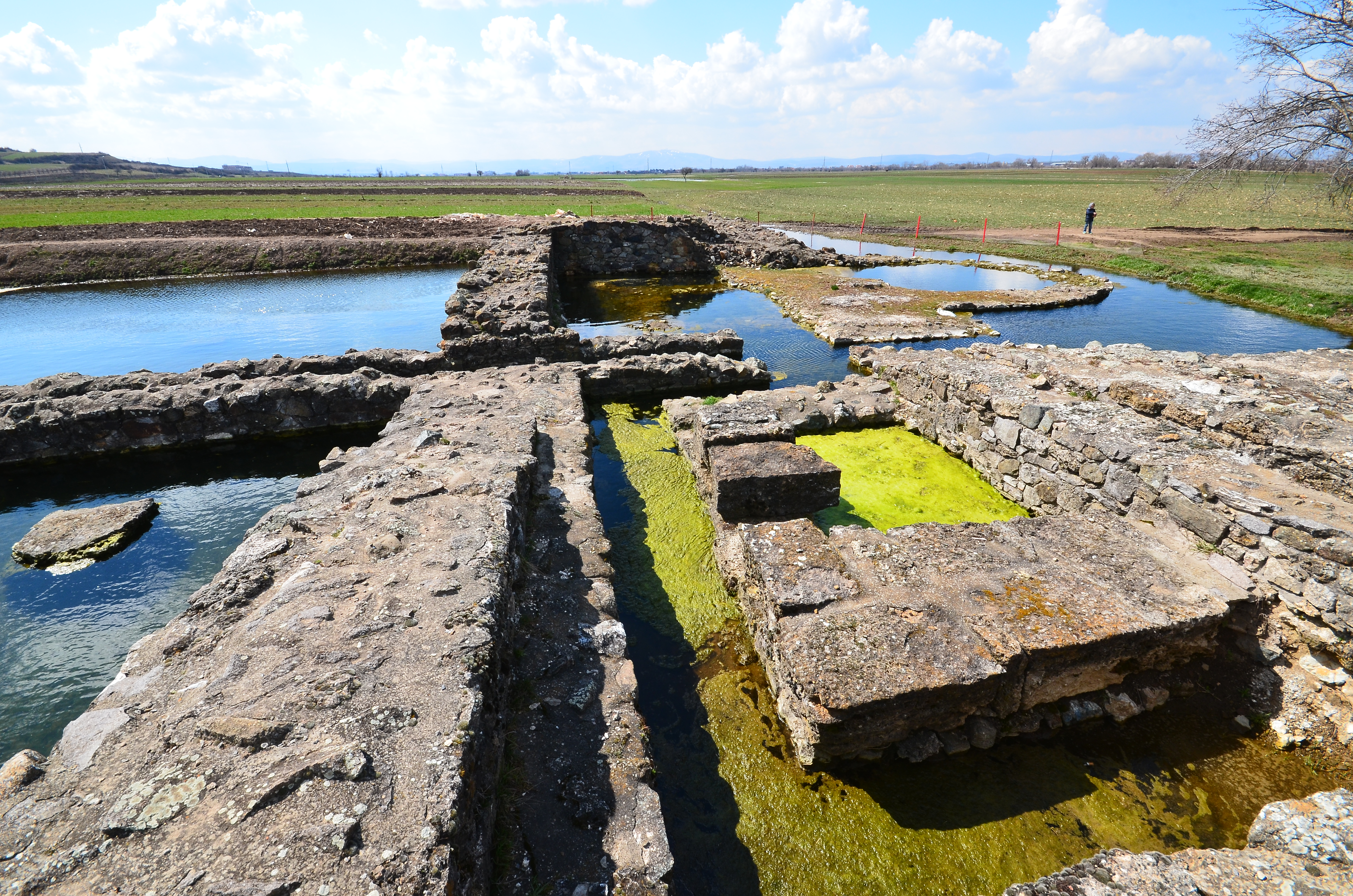 ULPIANA-lokaliteti arkeologjik